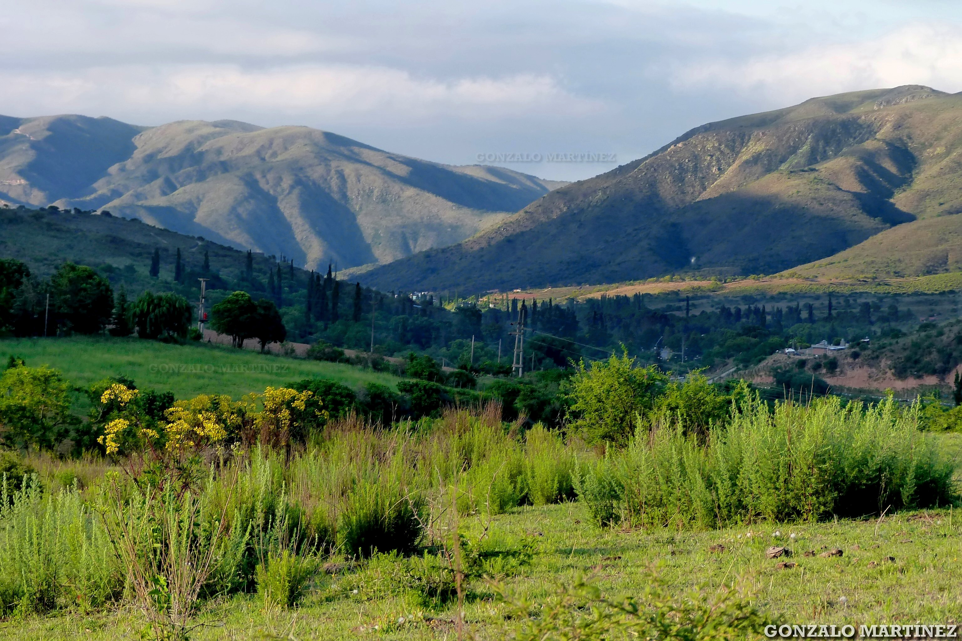 Vista de la localidad de Las Juntas al comienzo de la primavera en la provincia de Catamarca, Argentina. Foto: Gonzalo Martínez